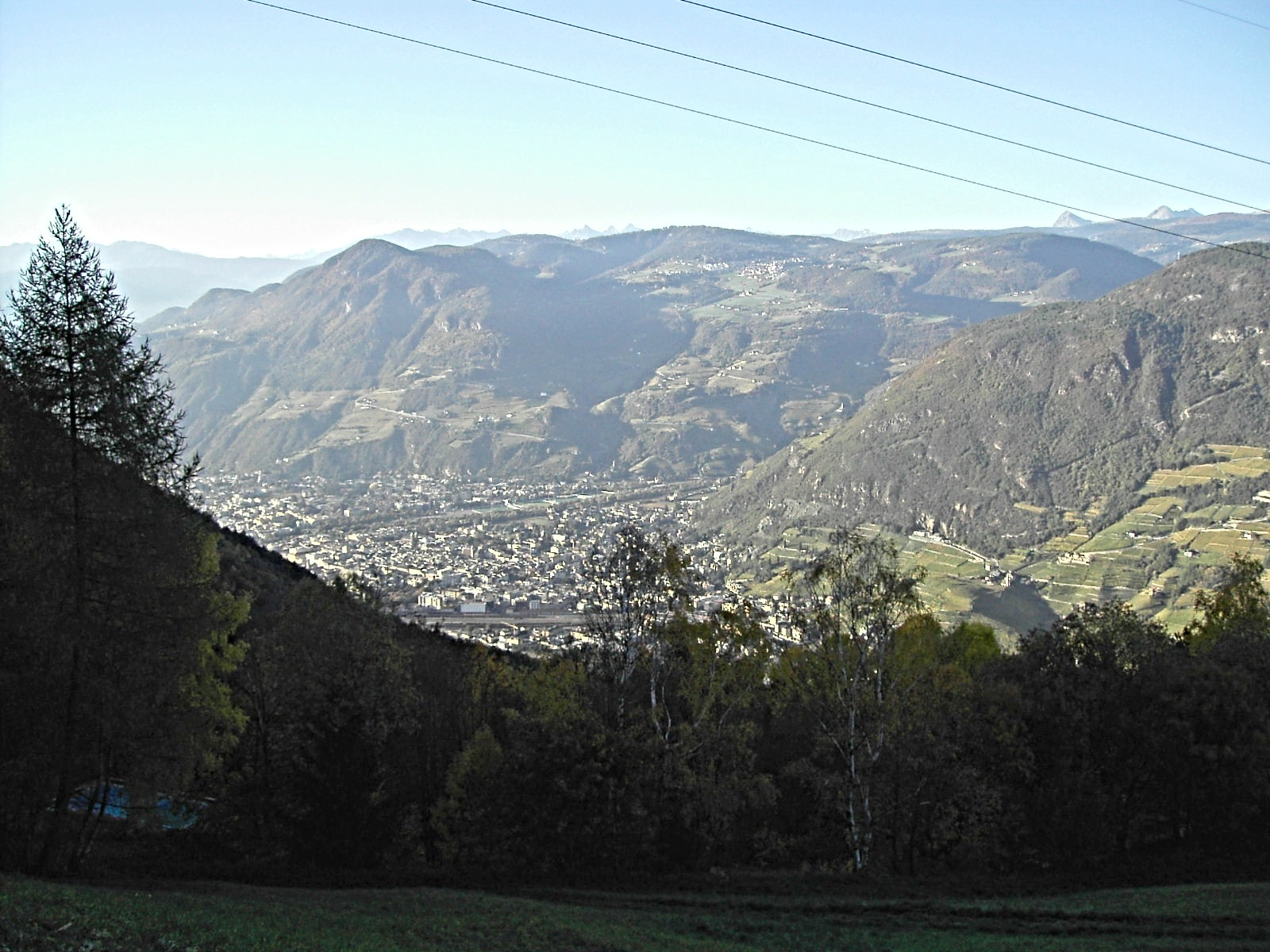 Bozen-Bolzano dal Colle/vom Kohlern aus